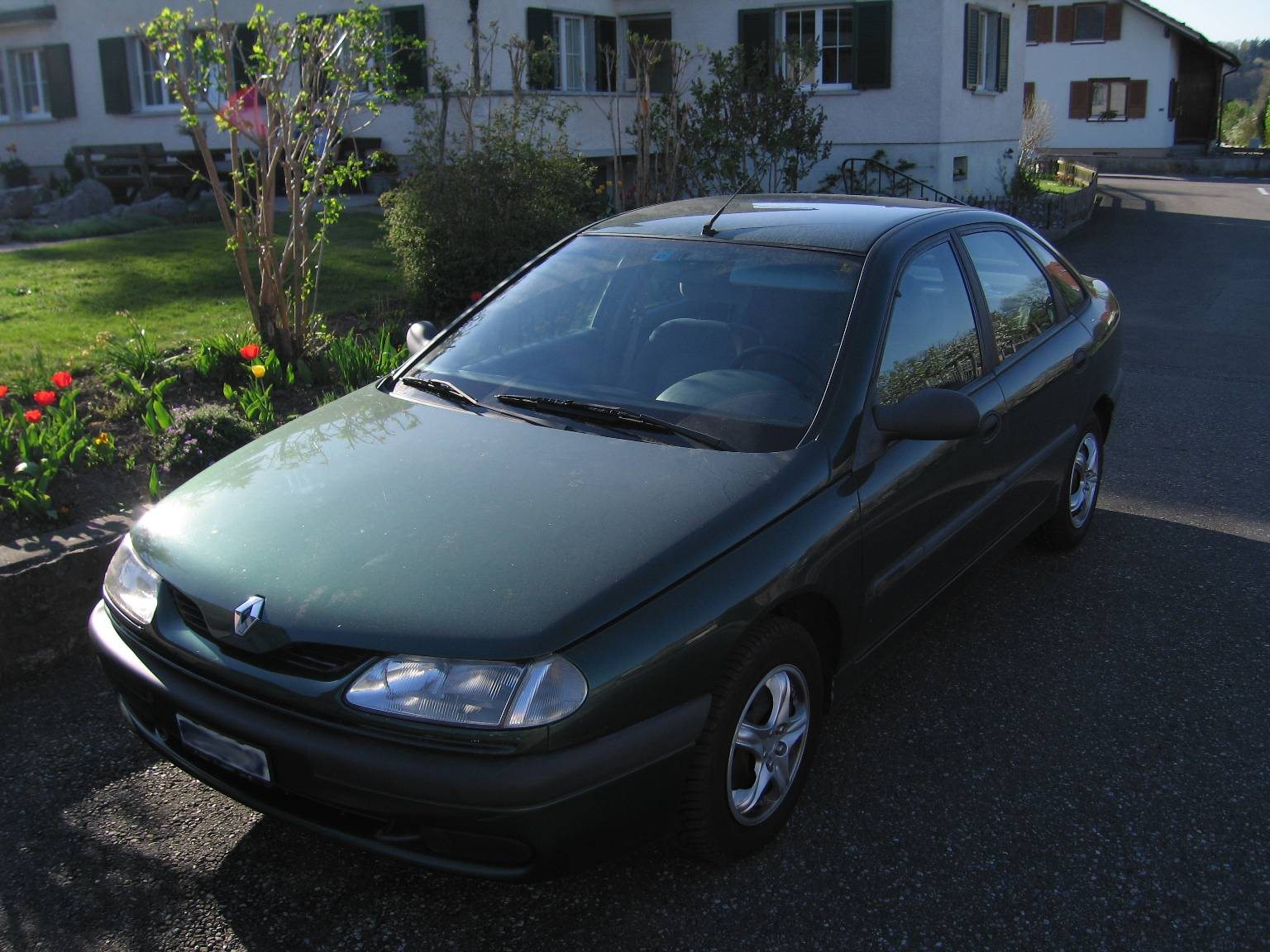 Renault Laguna 2.0 RT (Baujahr 1998)